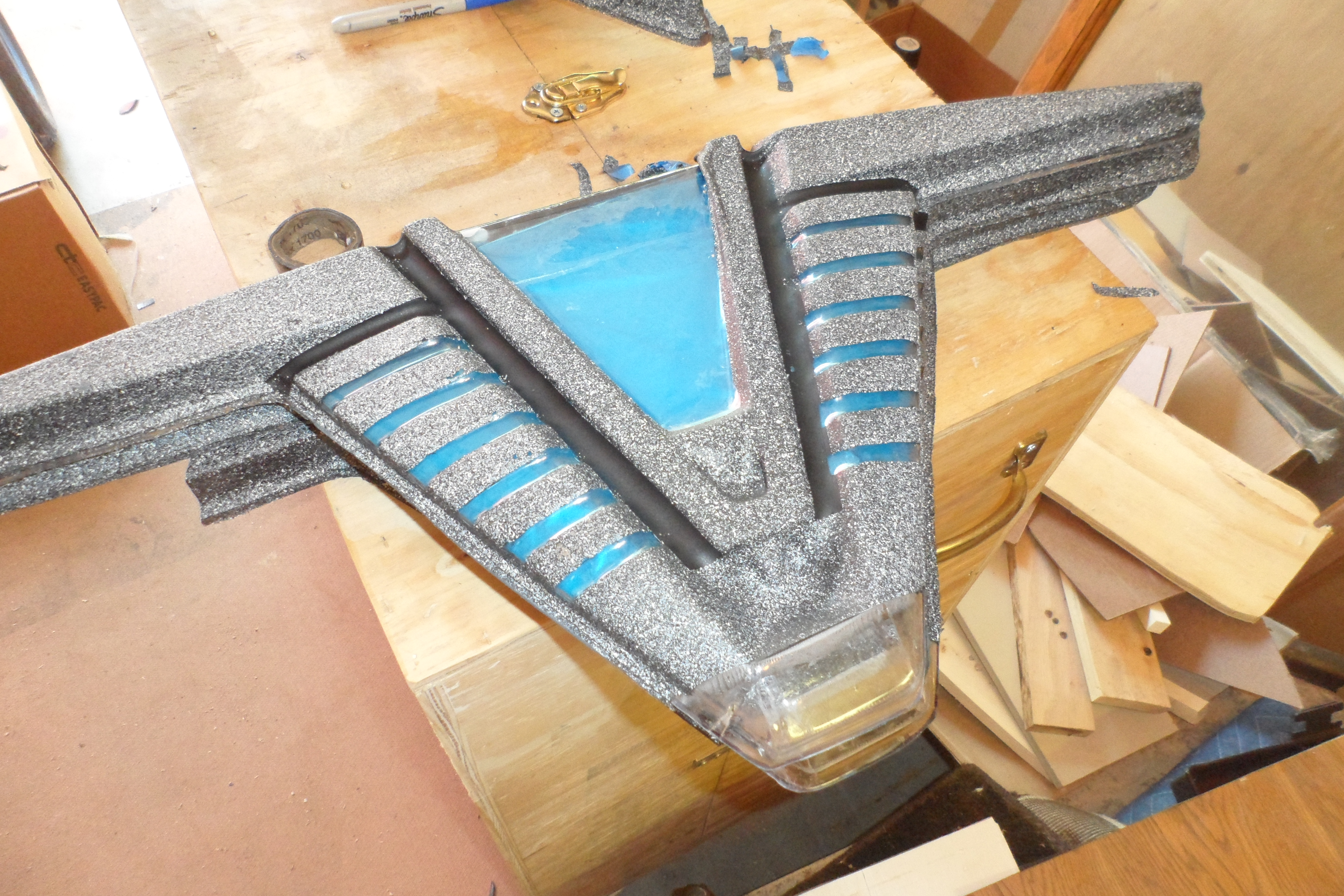 Un chevron, élément d'une porte des étoiles de l'univers de fiction Stargate.